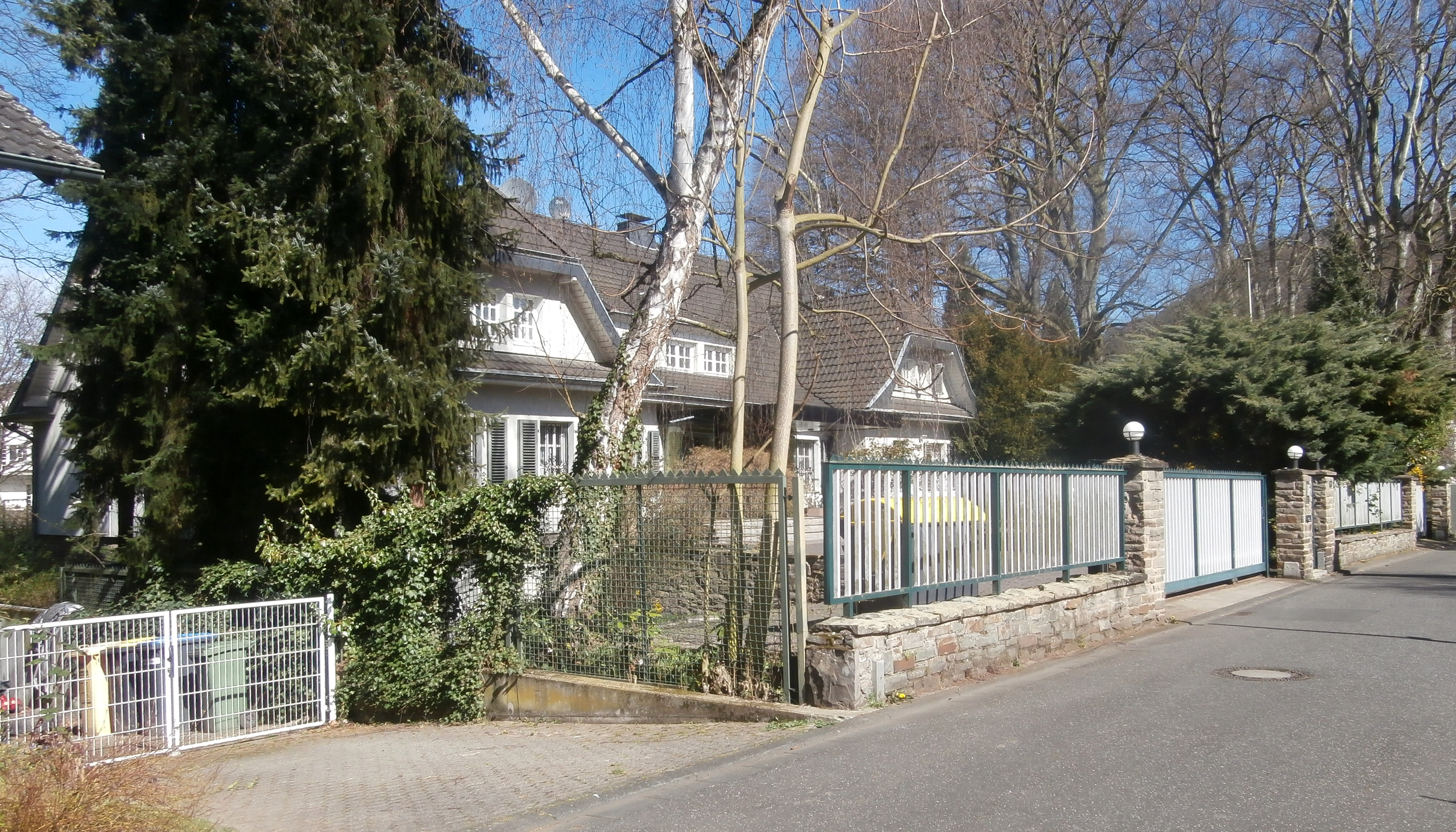 Ehemalige Residenz der Botschaft von Algerien, Viktor-Schnitzler-Straße 13, Mehlem, Bad Godesberg